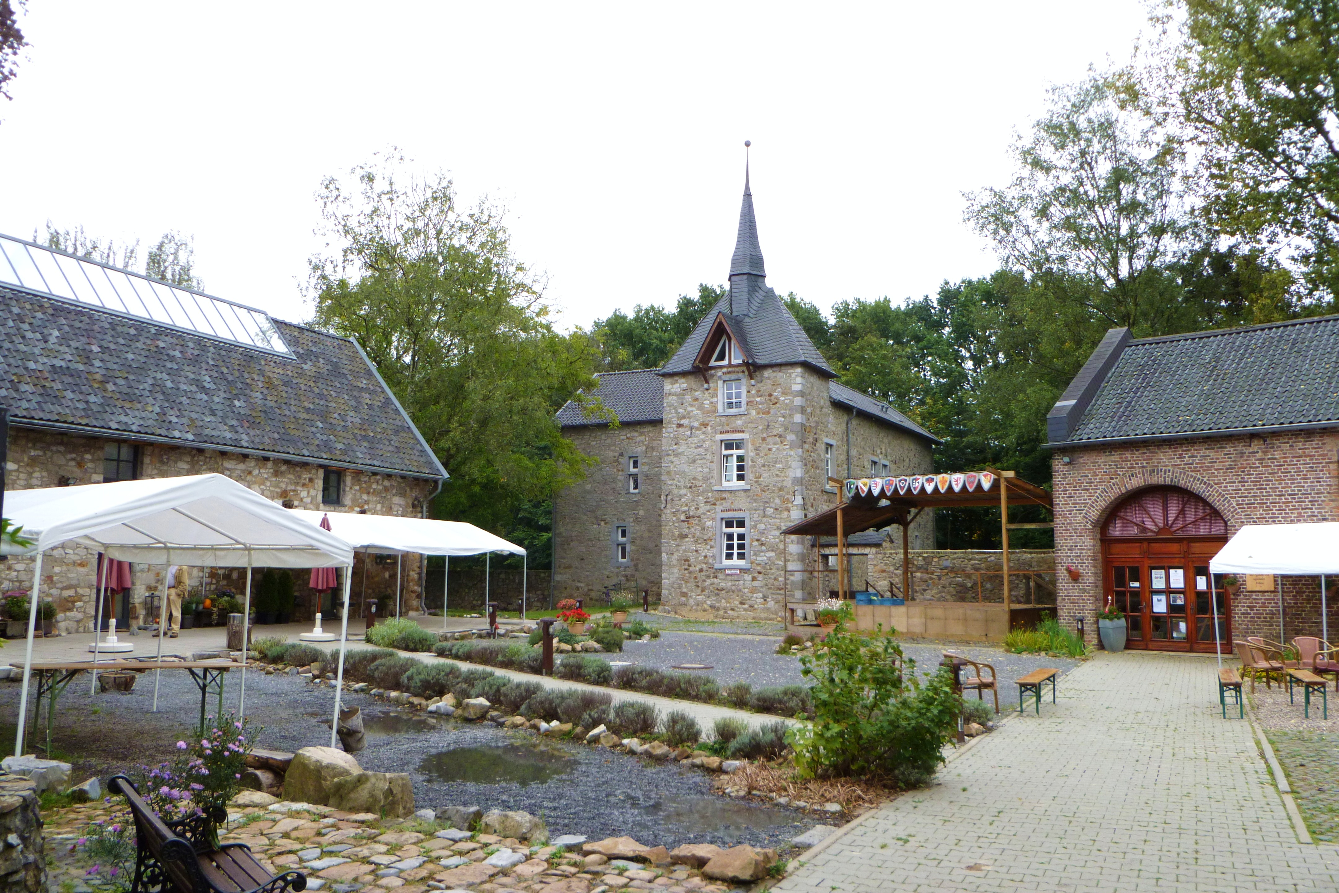 Baudenkmal in Aachen-Forst